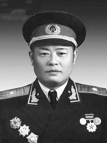 中文（中国大陆）: 谢振华少将1955年授衔照